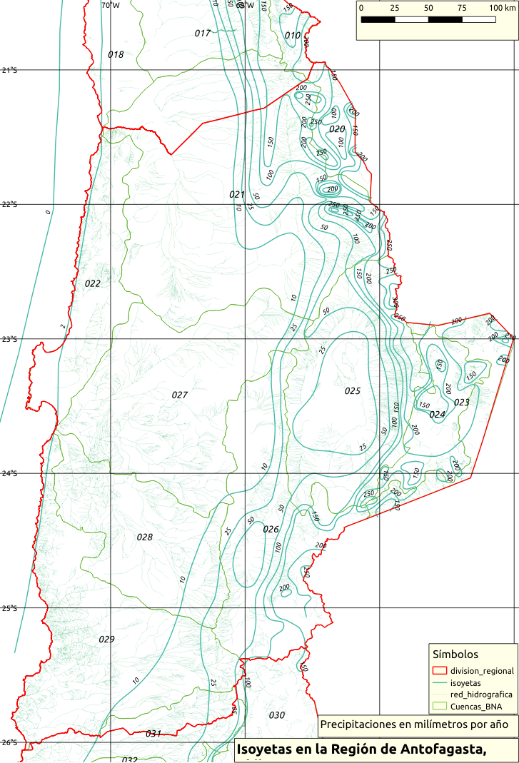 Isoyetas, cuencas hidrográficas y red de drenaje en la Región de Antofagasta, Chile. La información fue extraída desde las siguientes shapefiles: isoyetas MBN Regiones desde BCN/poligregiones/division_regional.shp Red de drenaje BCN/redhidro/red_hidrografica.shp Cuencas desde Ministerio de Bienes Nacionales : Cuencas_BNA.zip